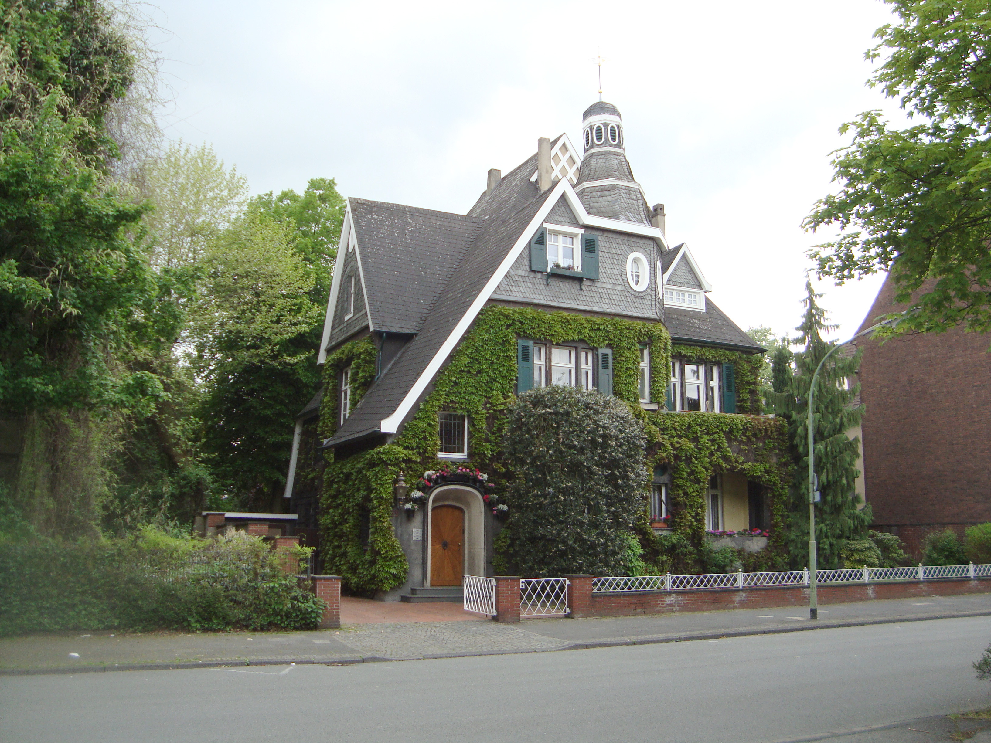 Villa Langekampstr. 35 in Herne-Wanne This is the photograph of an architectural monument. It is part of the list of cultural monuments of Herne, no. 85